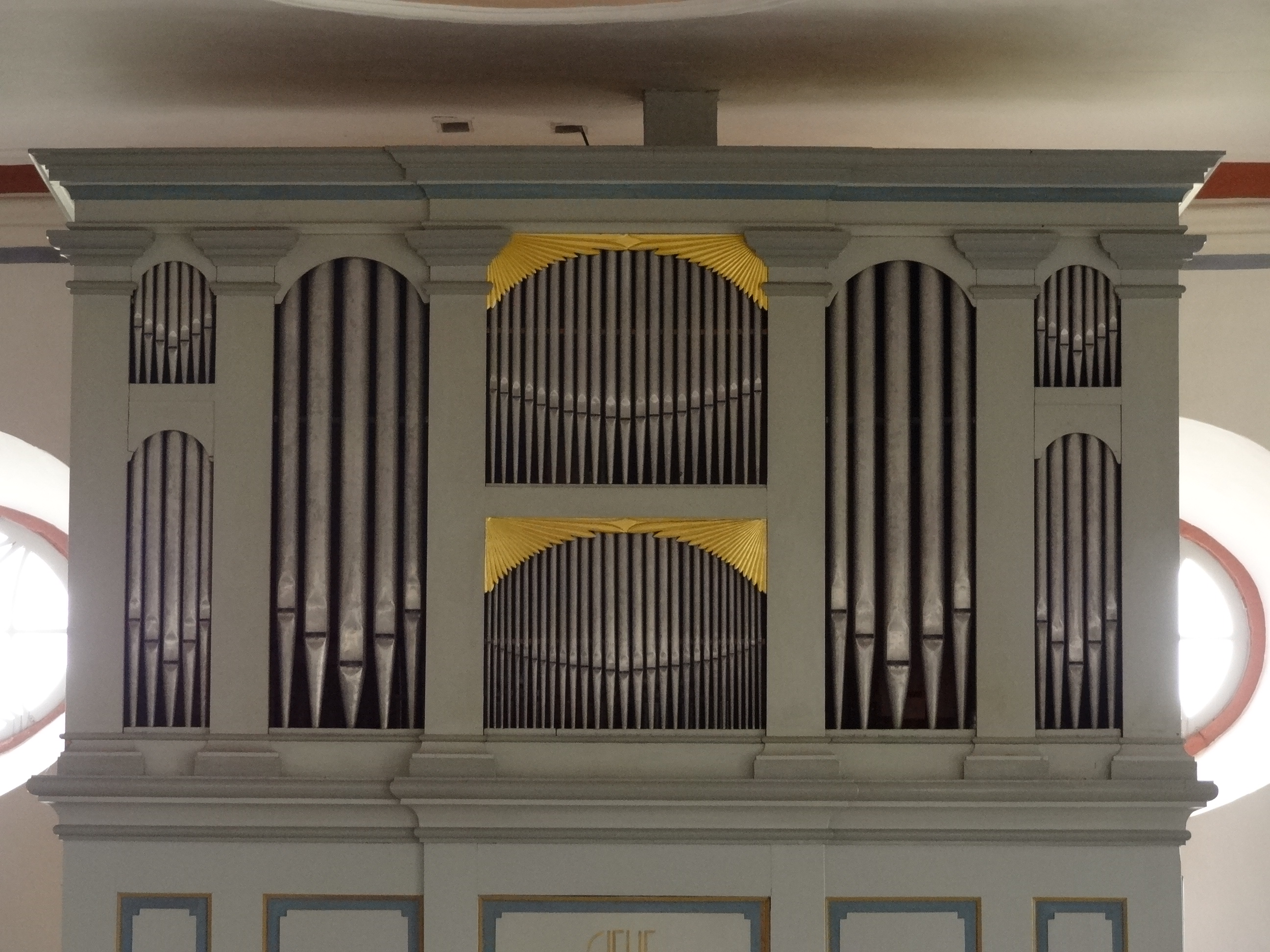 Evangelische Kirche Ober-Hörgern